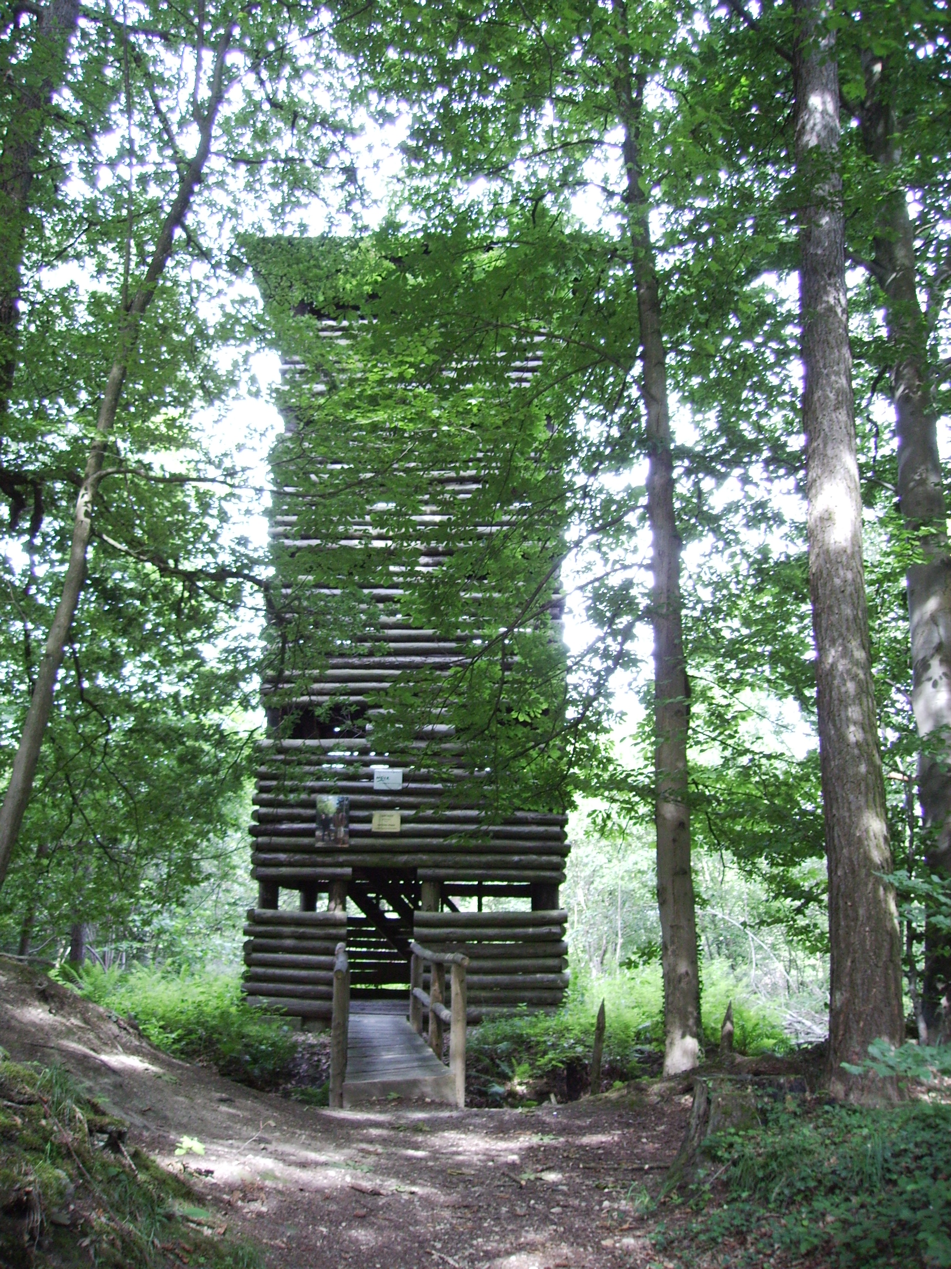 Chartaque 1